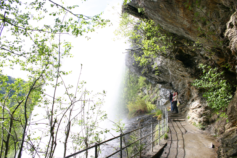 Under_the_rumbling_Steinsdalsfossen